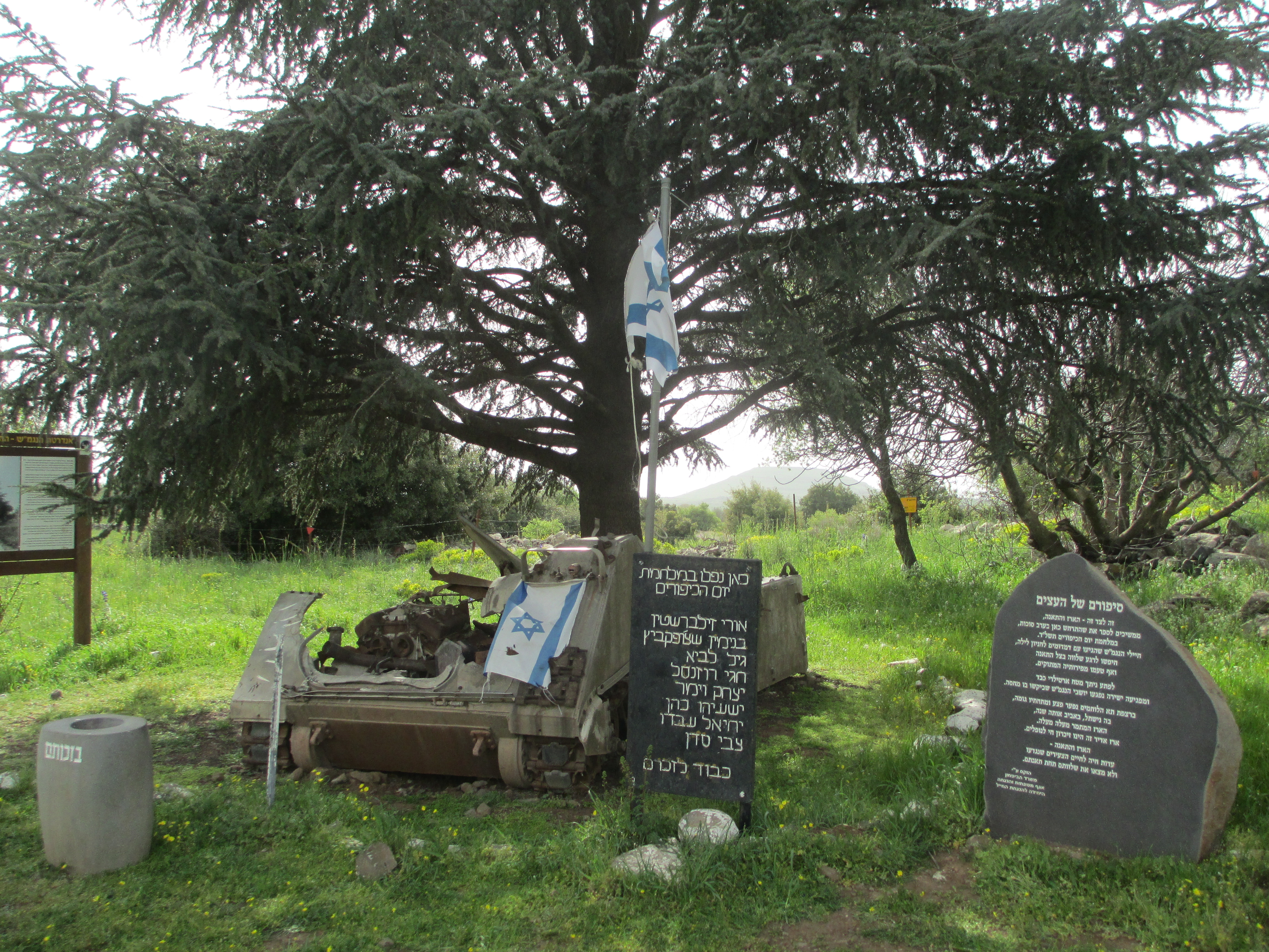 אנדרטת הנגמ"ש והארז בגולן